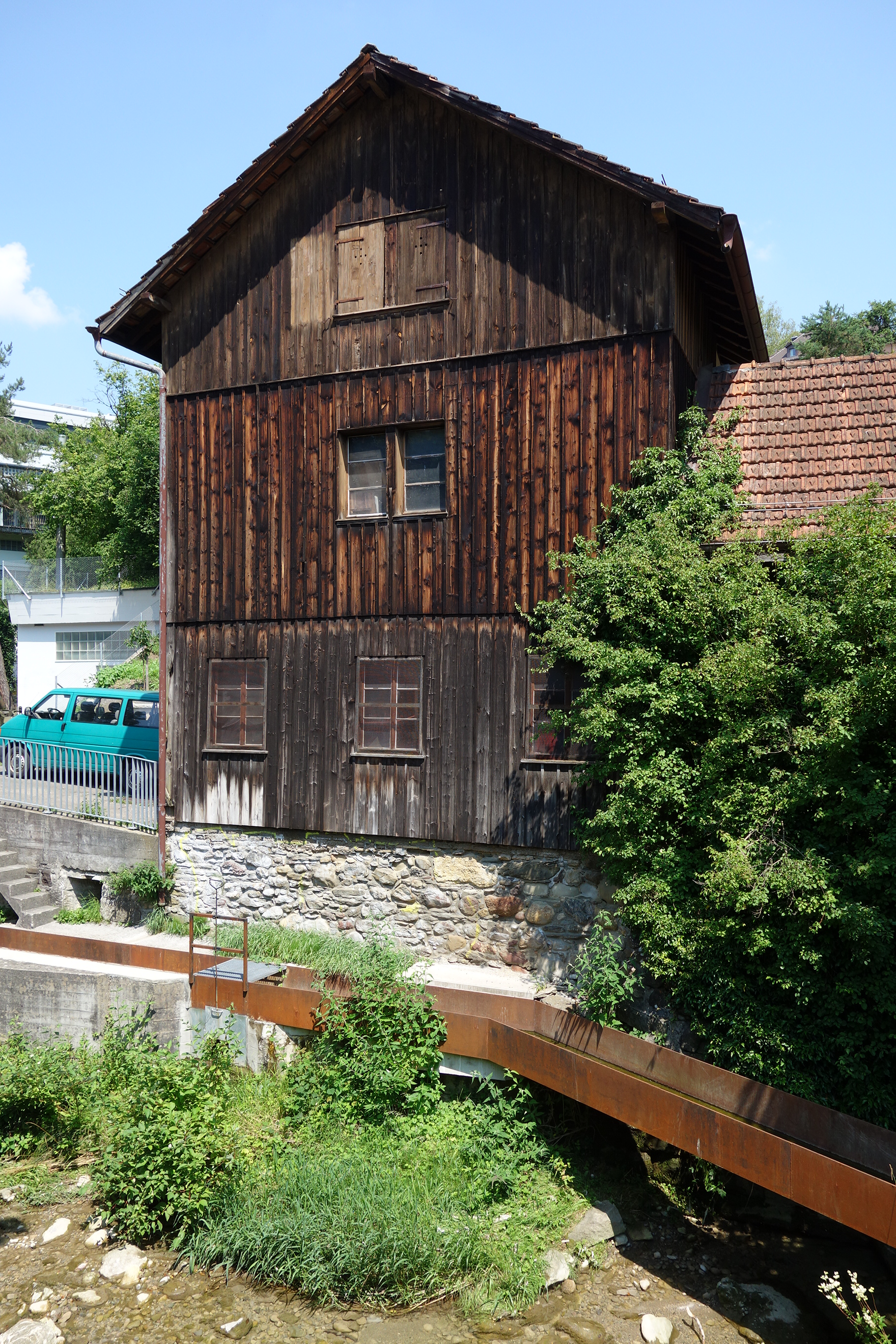 Farbholzmühle am Wehrenbach, Hirslanden, Zürich, Schweiz